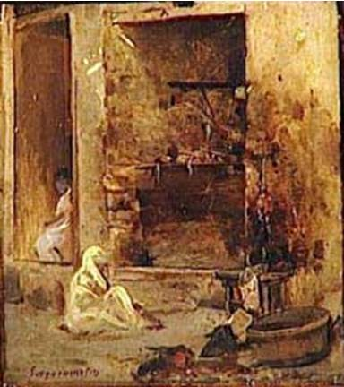 a study